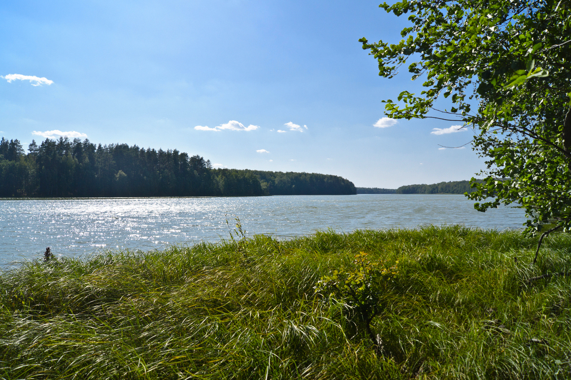 Озеро Виша, подъезд из деревни Вамна. Географически - напротив деревни Красный Бор.